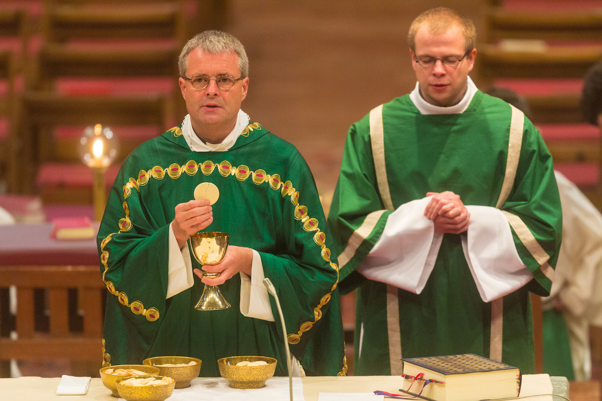 Generalvikar Rösch bei der Feier einer Messe in St. Bonifatius Wiesbaden am 27.10.2013. Rechts im Bild Diakon Radoslaw Lydkowski.